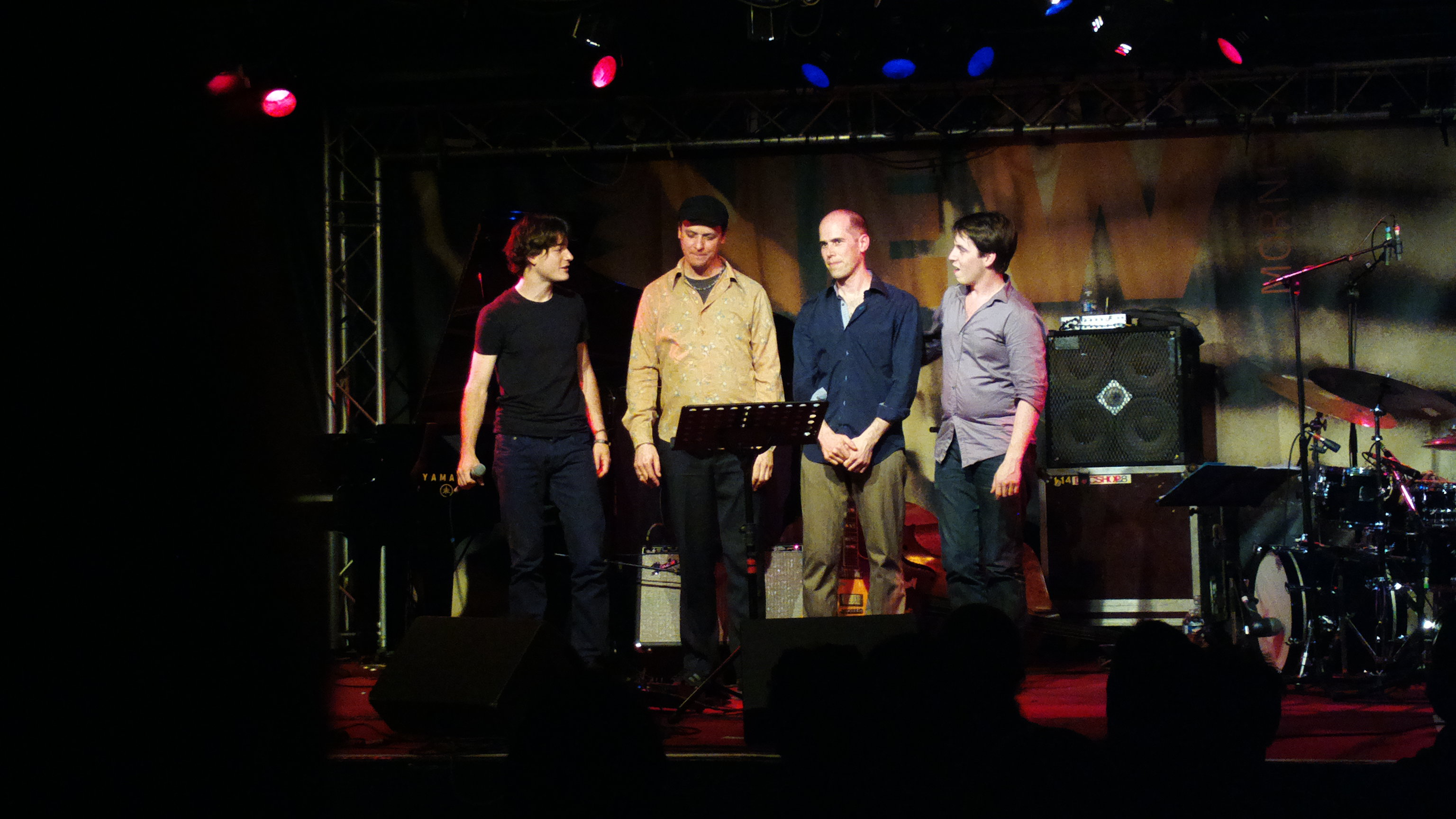 Thomas Enhco (Piano), Kurt Rosenwinkel (Guitare), Chris Jennings (Contrebasse), Nicolas Charlier (Batterie) : concert au New Morning (Paris) le vendredi 07 juin 2013